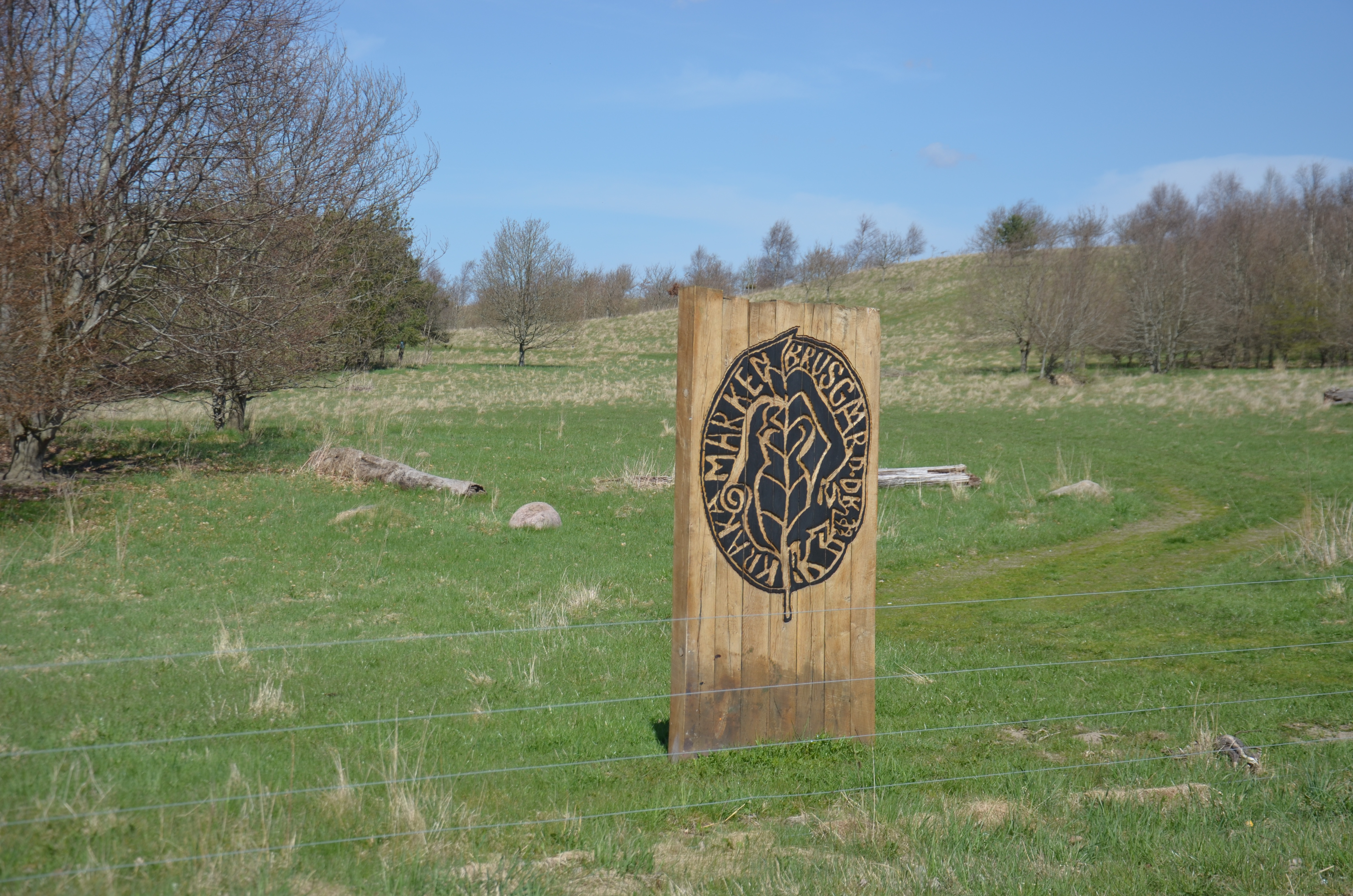 Entrance to Krakamarkens land art park